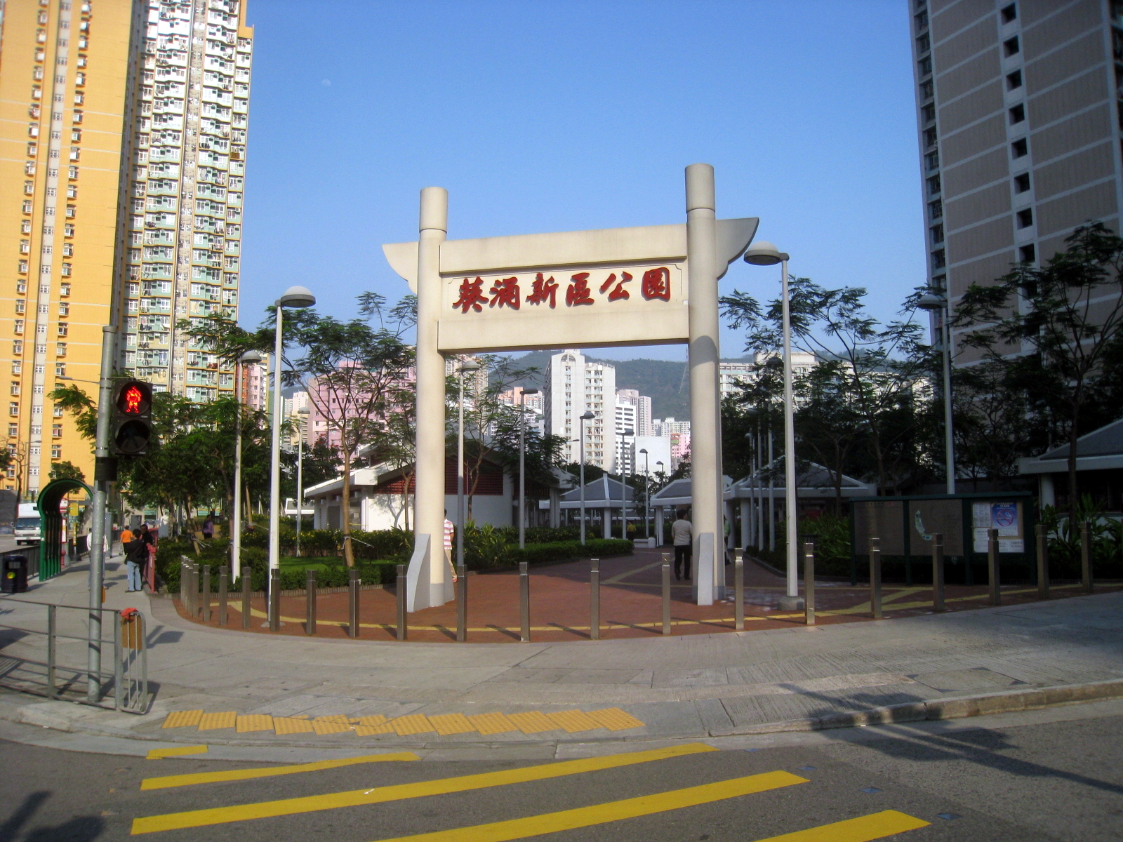 Kwai Chung Estate Park